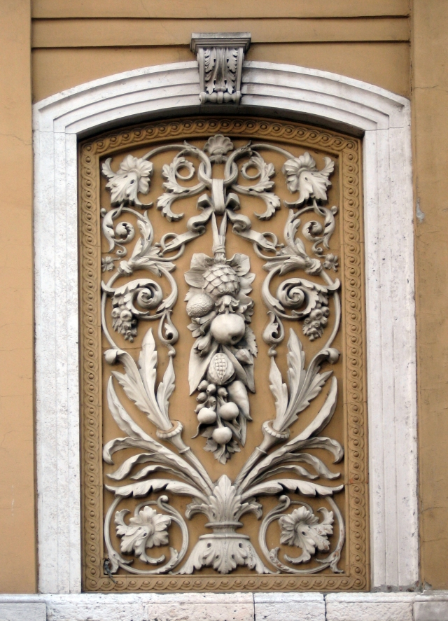 detalj s paviljona tržnice u Rijeci